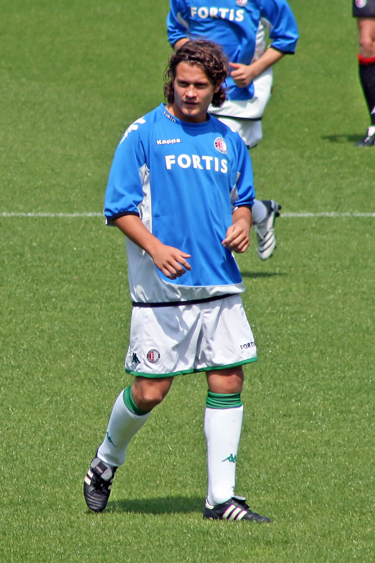 Sacha Visser